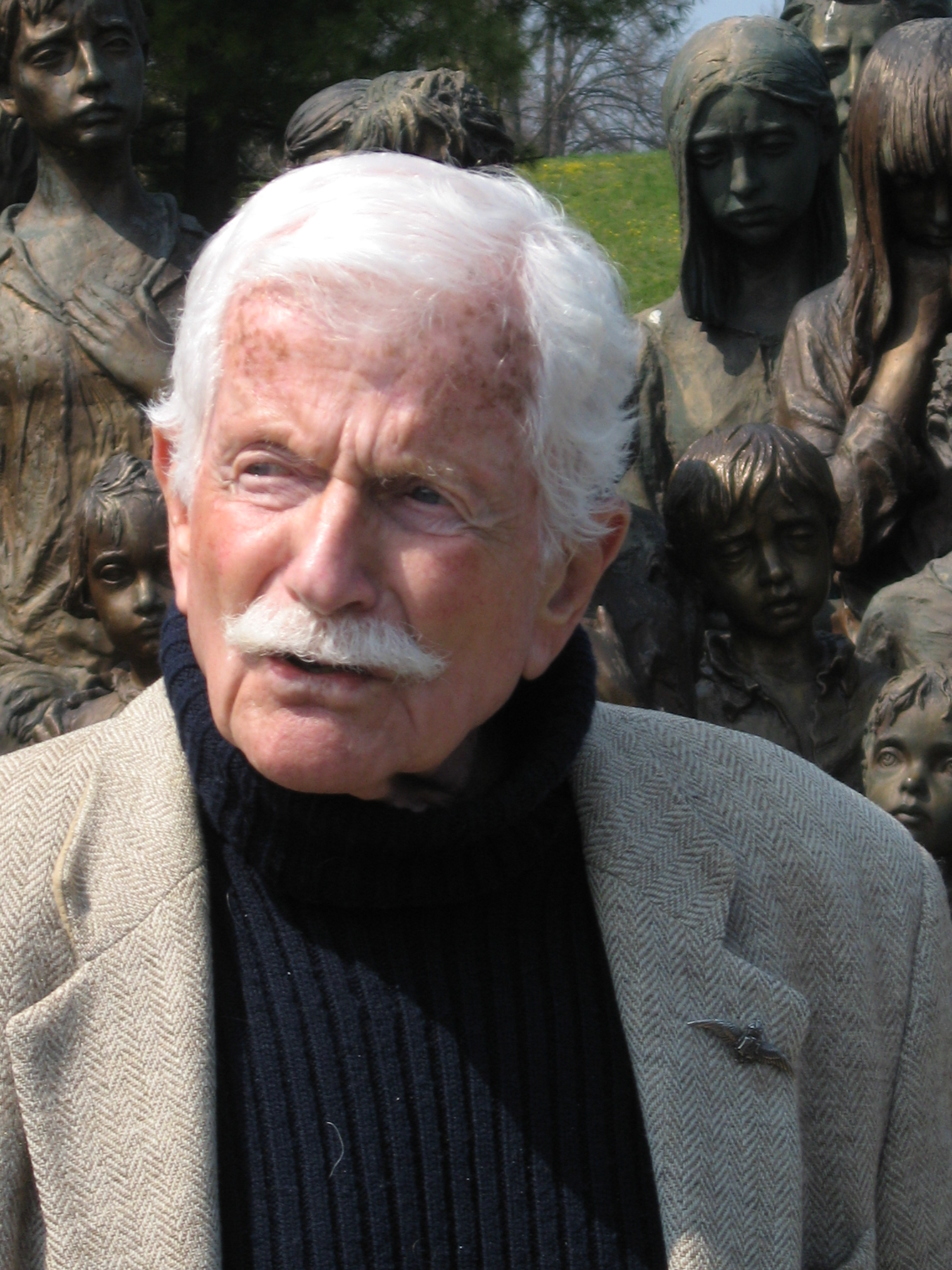 Colonel Jan Wiener in Lidice